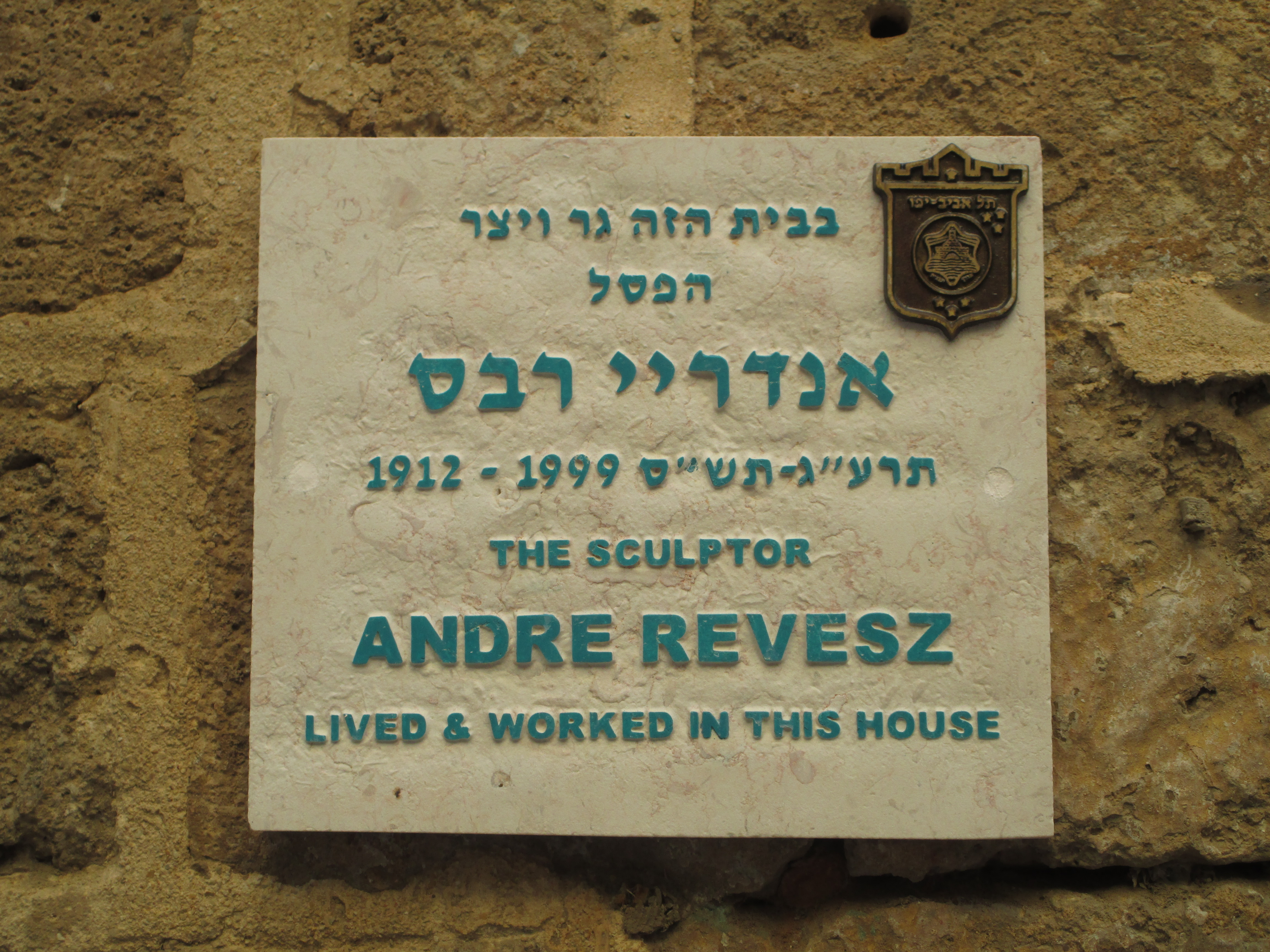 לוחית זיכרון לפסל אנדריי רבס